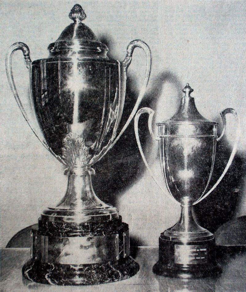 Trophées des deux premières éditions de la Coupe d'Algérie. Celui de 1963 est à droite et celui de 1964 est à gauche.